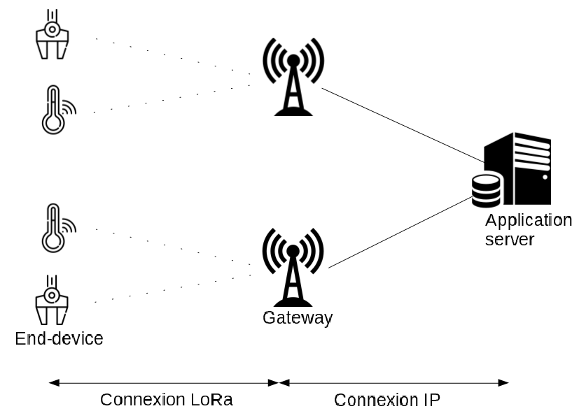 Schéma d'une architecture LoRaWAN représentant des objets connectés, des passerelles et un serveur d'application